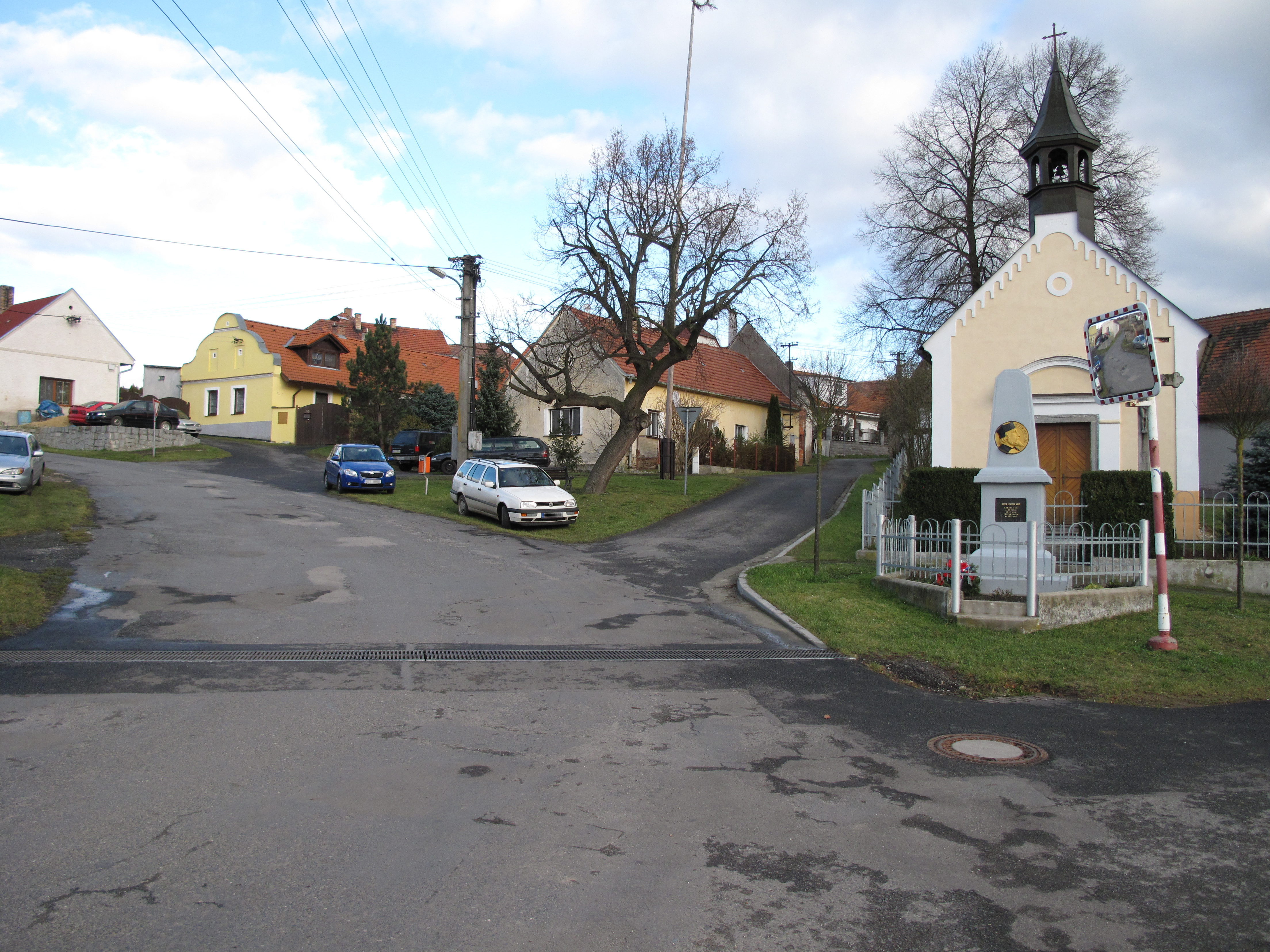 Náves ve Slaníku. Okres Strakonice, Česká republika.